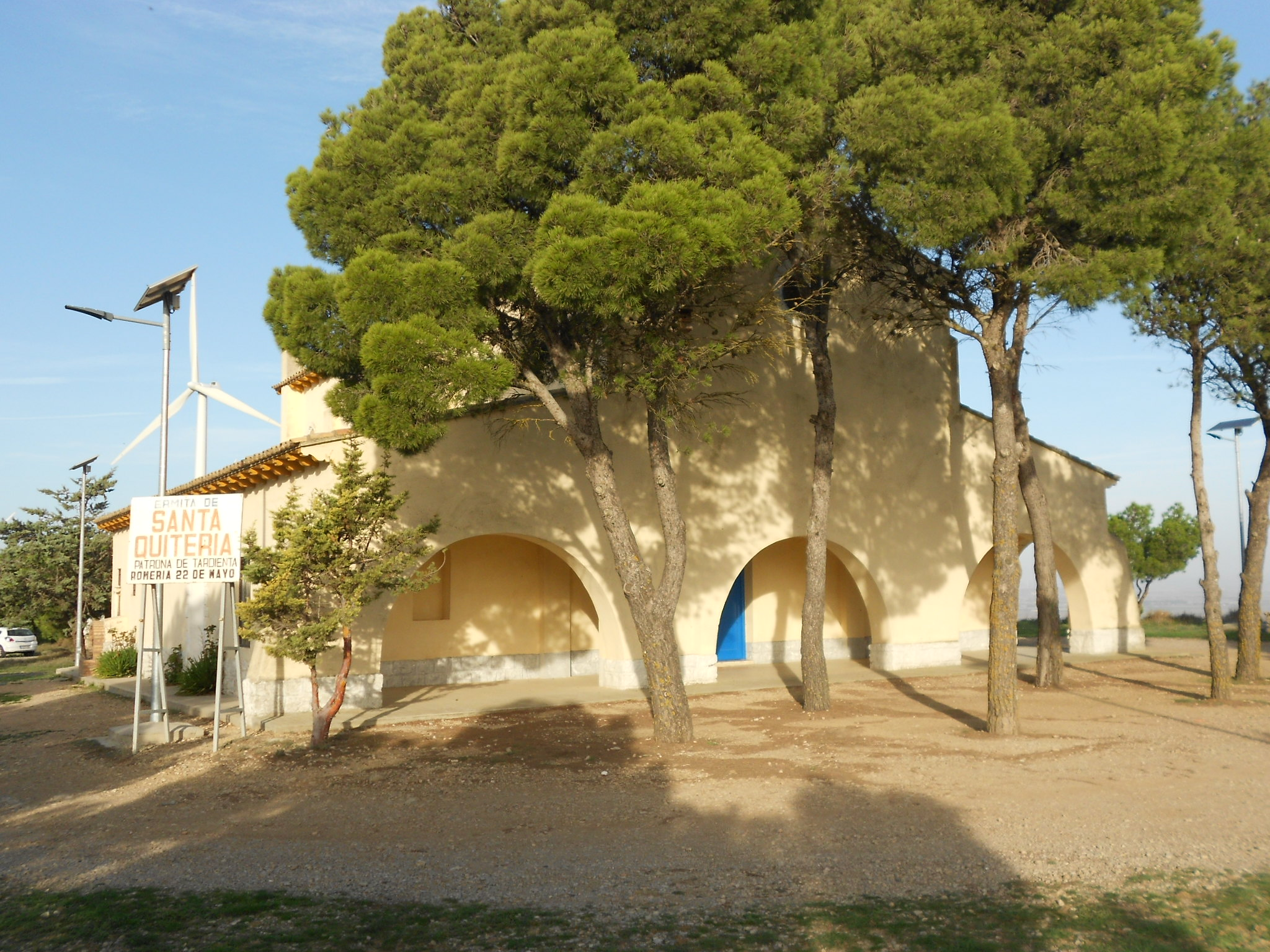 Ermita de Santa Quiteria (Tardienta, Aragón, España).